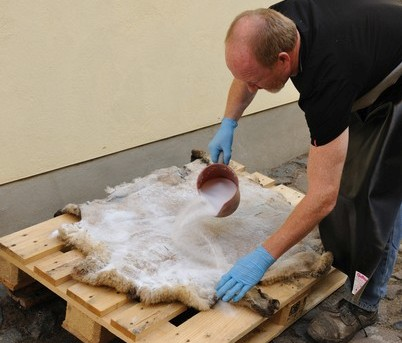 Einsalzen eines einzulagernden Schaffelles zum Konservieren bis zur Pelzzurichtung. Udo Meinelt & Söhne, Rötha